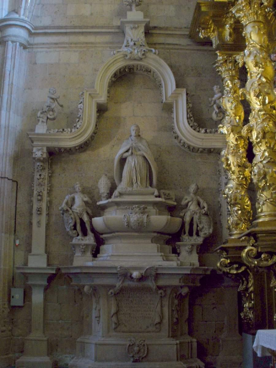 Segovia - Catedral, Capilla de San Anton